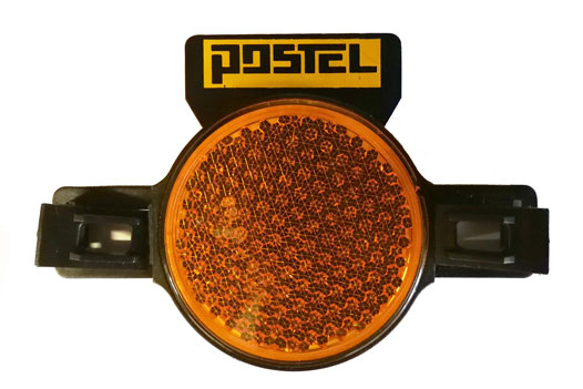 Videotexbolaget Postels logotype, placerad på en cykelreflex